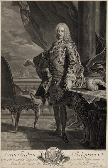 Portrait de Jean Frédéric Phélypeaux, comte de Maurepas (1701-1781)